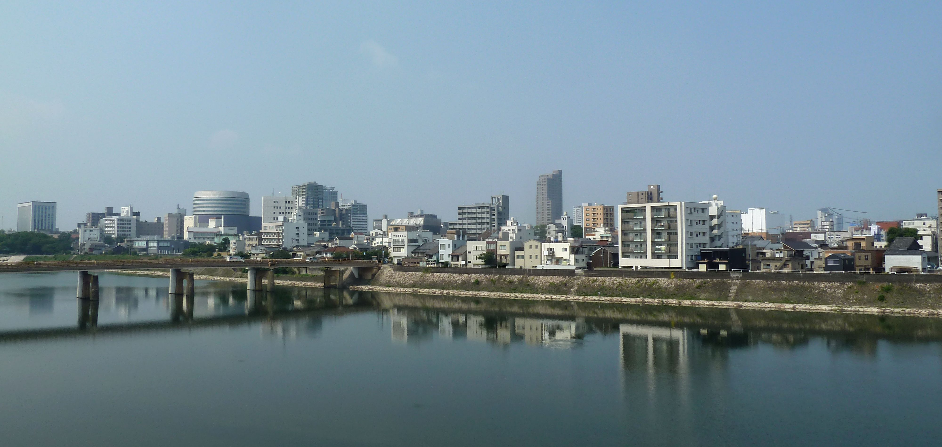 岡山市中心部